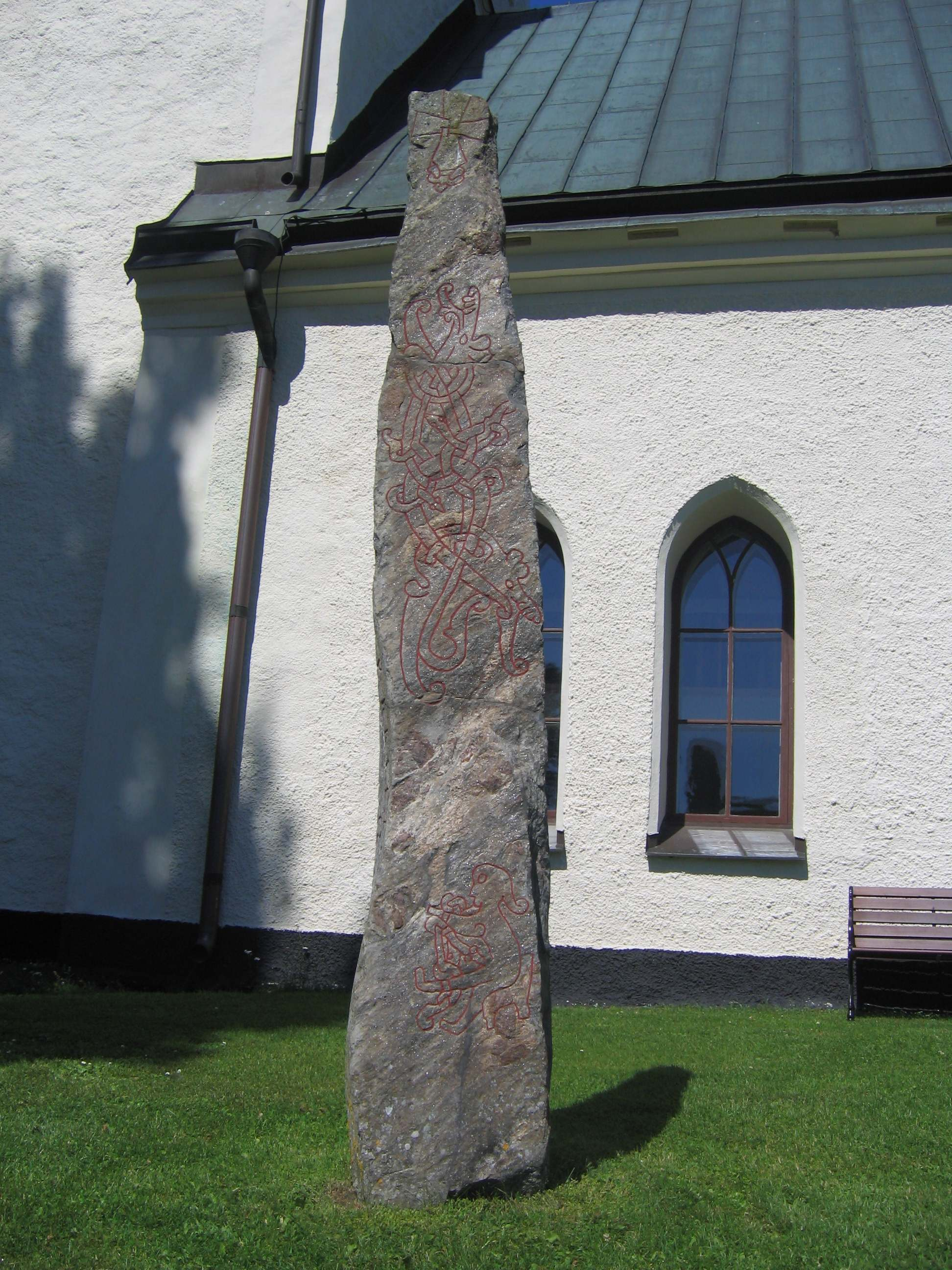 Runstenen Sö 40 vid Västerljungs kyrka i Trosa kommun.